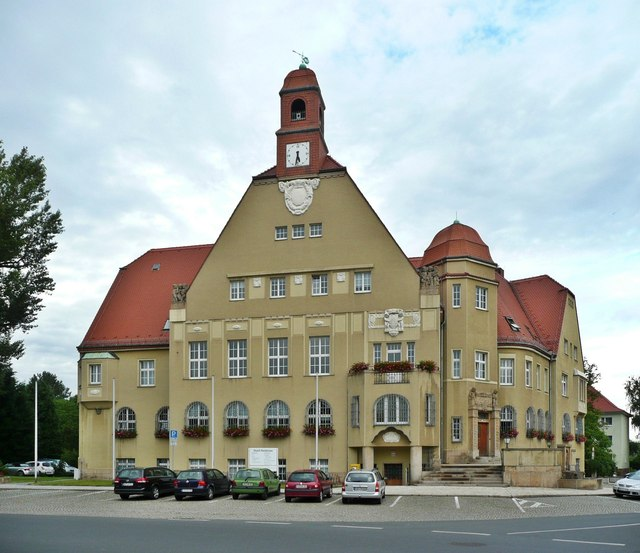 Heidenau: Blick auf das Rathaus